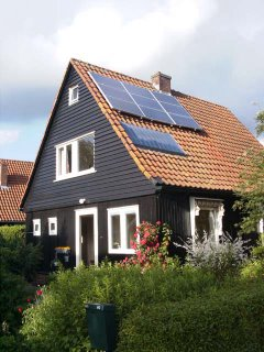 Voor/zijgevel Prins Bernhardstraat 60 Leeuwarden, met net geplaatste zonnecollector / zonnepanelen, juni 2003